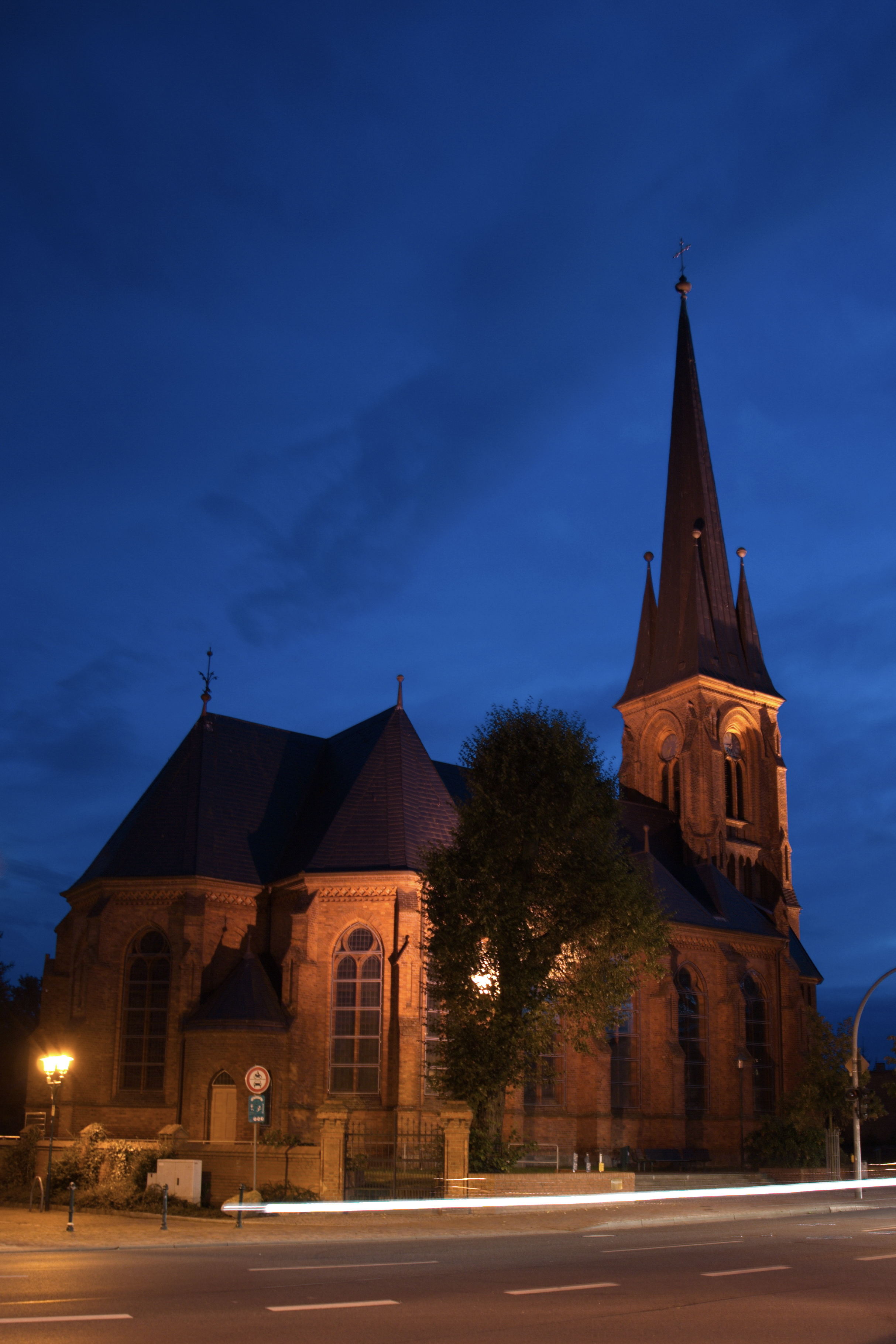 Torgelow 17358, Evangelische Kirche